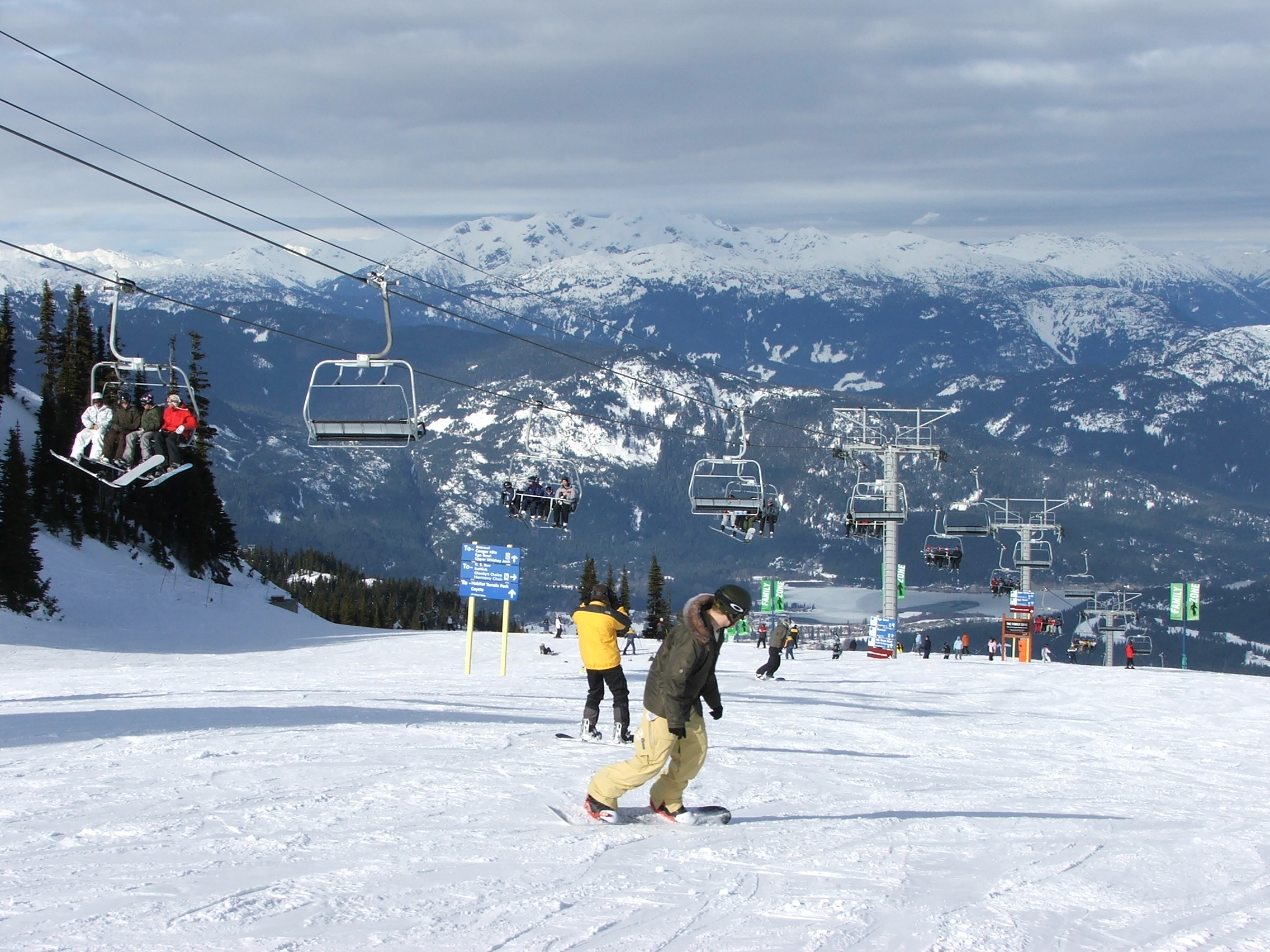 Скијање на Вислеру